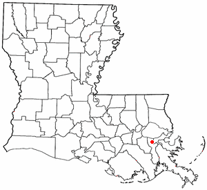 Volapük: Topam in tat: Louisiana.